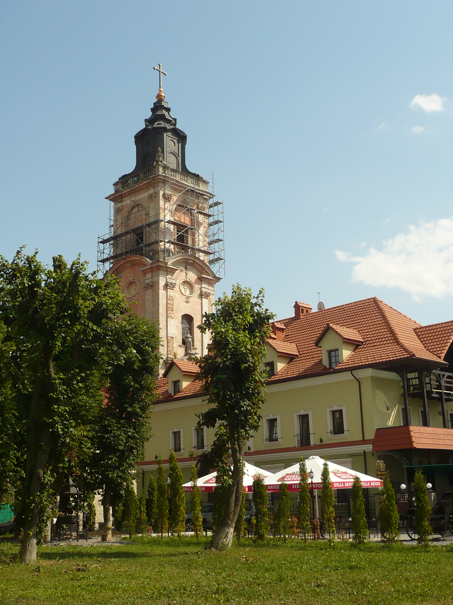 Kamieniec Podolski. Kościół pw. Mikołaja i klasztor oo. dominikanów